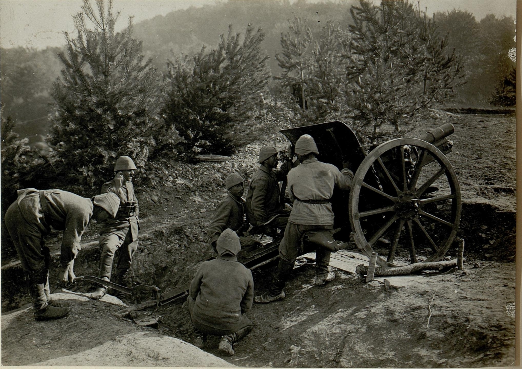 Türkische Artillerie bei Miesczegsow